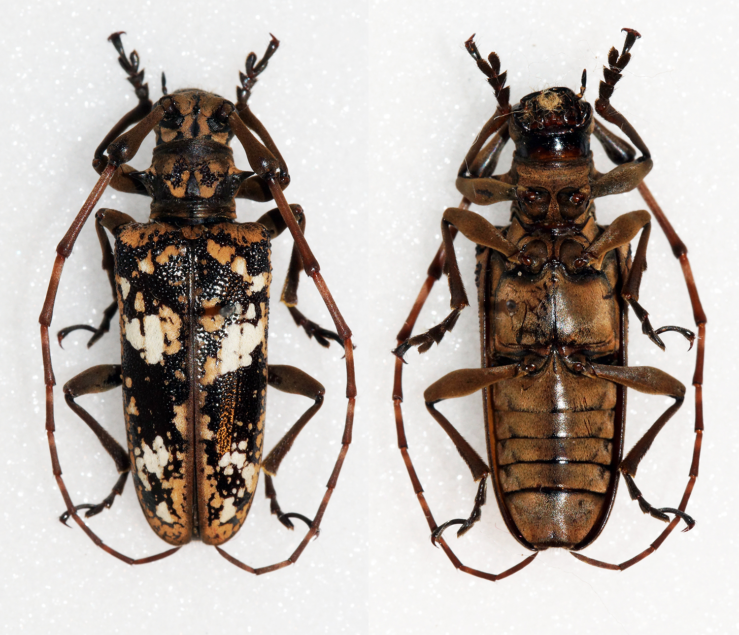 Breuning,1940 Sex: Female Data: 14-03-09 - Trus Madi Mts - Sabah - Malaysia Size: 19mm